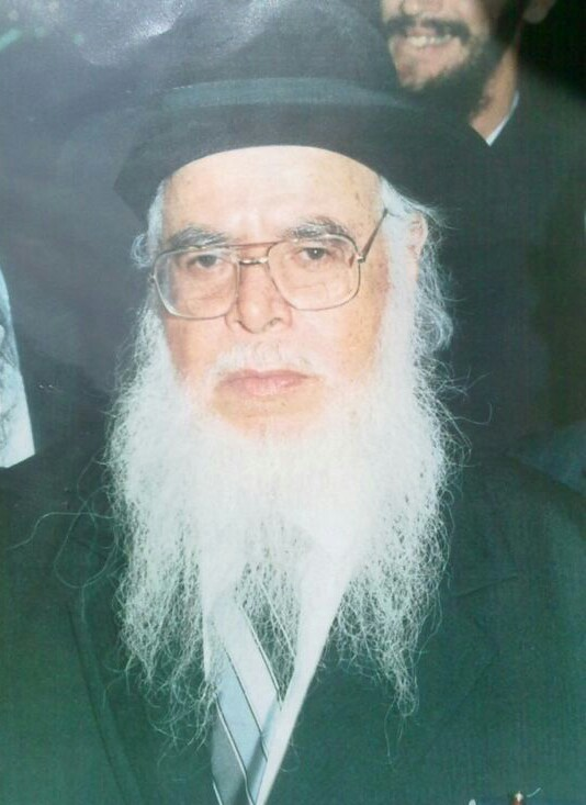 פרץ מימון היה רב יליד תוניסיה שעלה לישראל, שימש כרב המושב גילת.